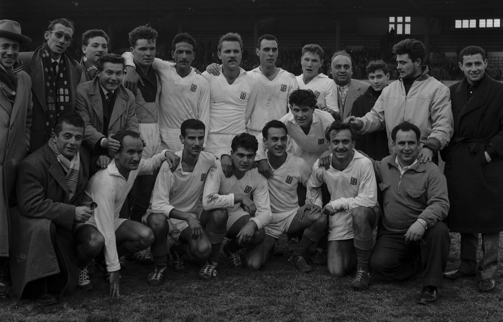 Stadium municipal de Toulouse, 1bis allées Gabriel-Biénès. 3 février 1957. Vue de l'équipe d'El Biar vainqueur du match contre l'équipe du Stade de Reims en Coupe de France.